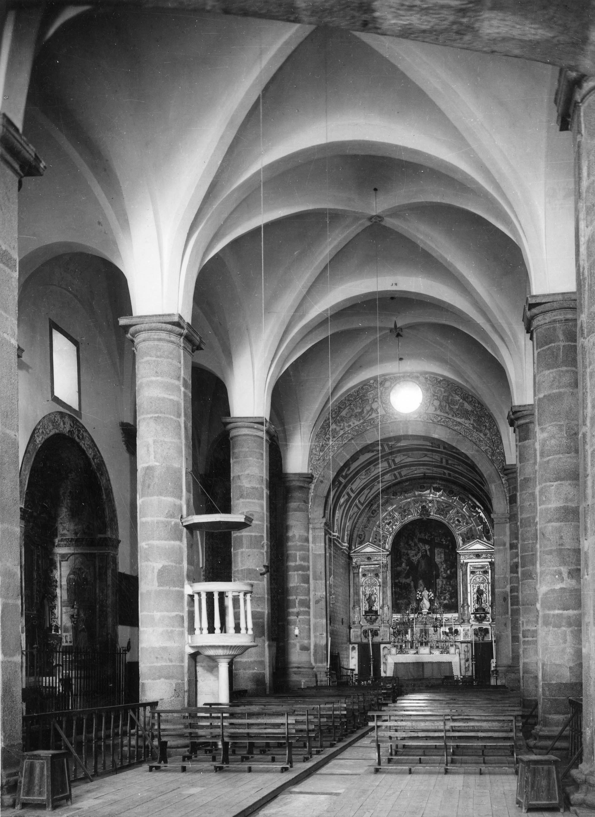 Fotógrafo: Mário Novais, 1899-1967. Orientador científico: Mário Tavares Chicó, 1905-1966. Data aproximada da produção da fotografia original: 1954. [CFT015.105.ic]